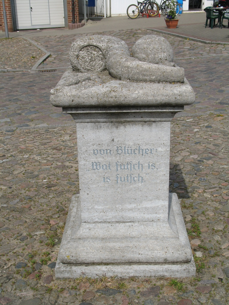 Skulptur: Marschall Blüchers Pfeife am Platz des Friedens in Teterow. Aufschrift: "Wat futsch is, is futsch."